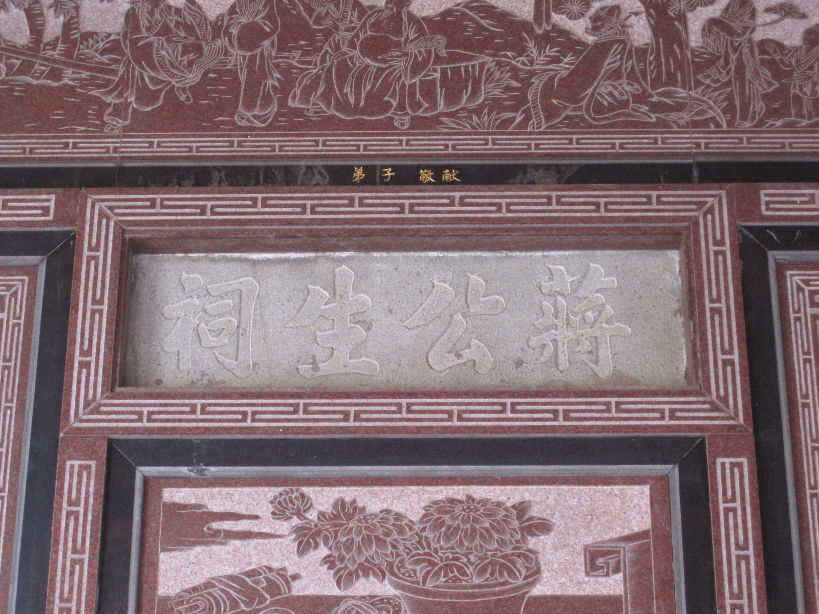 臺南開基三官廟蔣公生祠石額，此處的蔣公指的是蔣元樞。